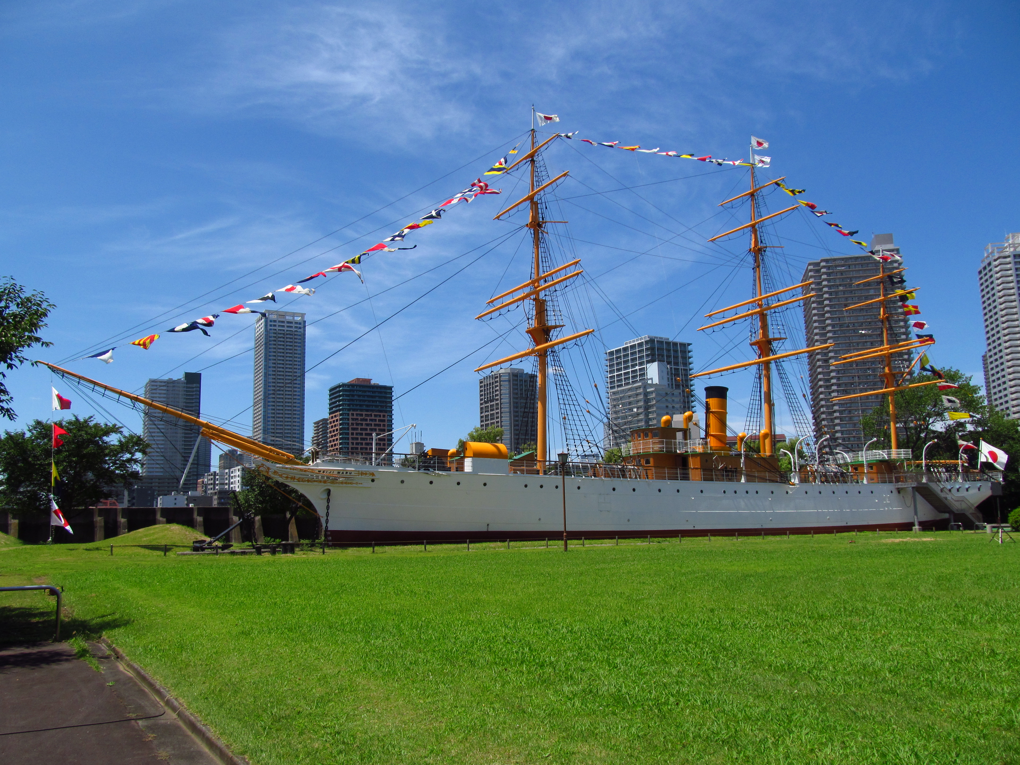 修繕後、明治丸修復完工記念式典で満船飾を綴った明治丸。